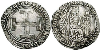 Corona de ca:462, de Ferran I de Nàpols, 1458-1494